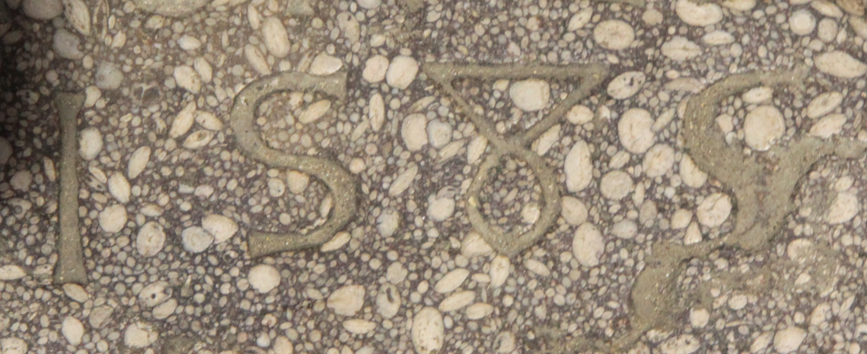 Fragment d'una làpida del monestir de Sant Pere de Besalú amb la inscripció de l'any 1585